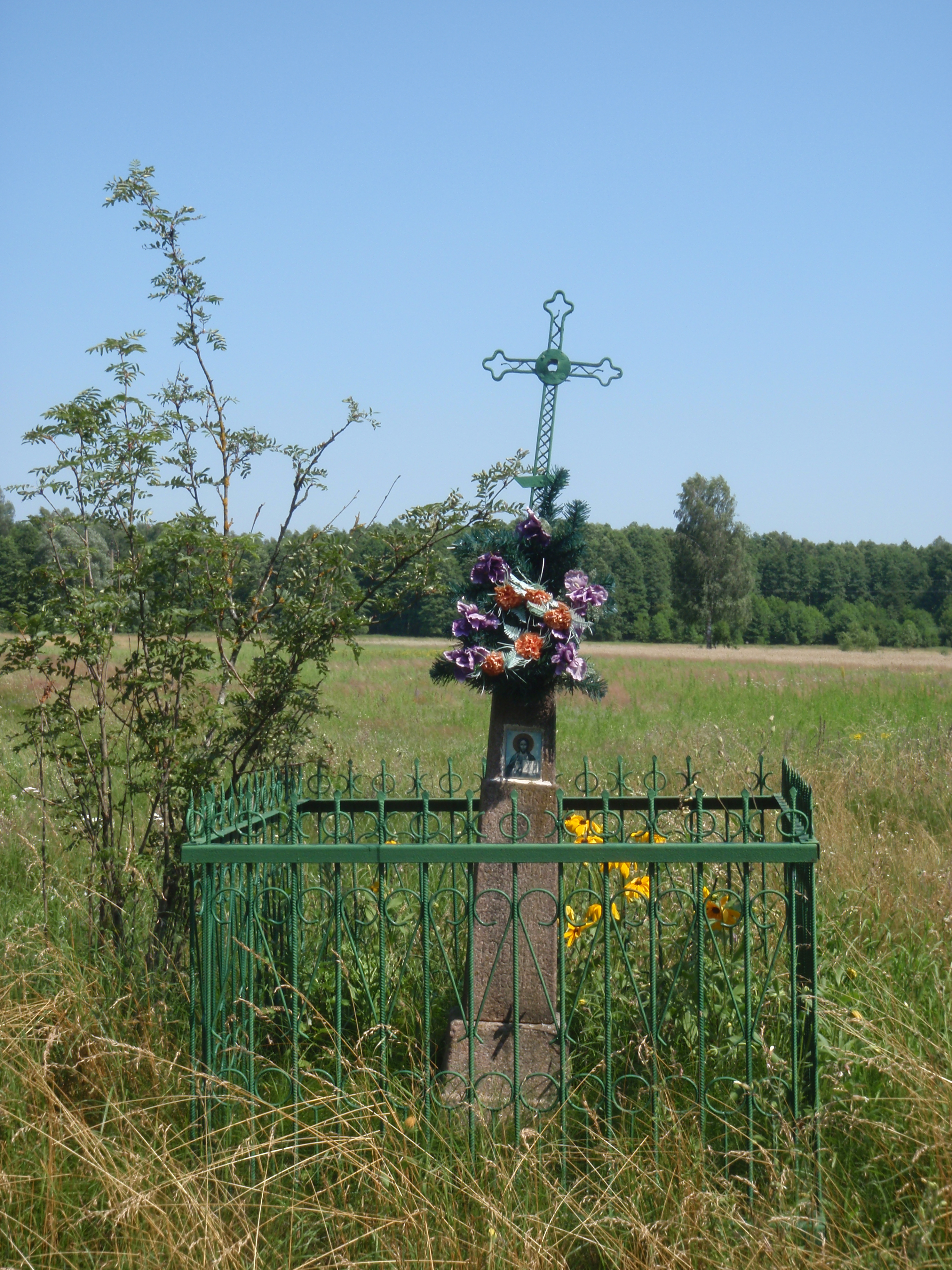 Krzyż prawosławny k/wsi Hajdukowszczyzna (od strony Makówki)